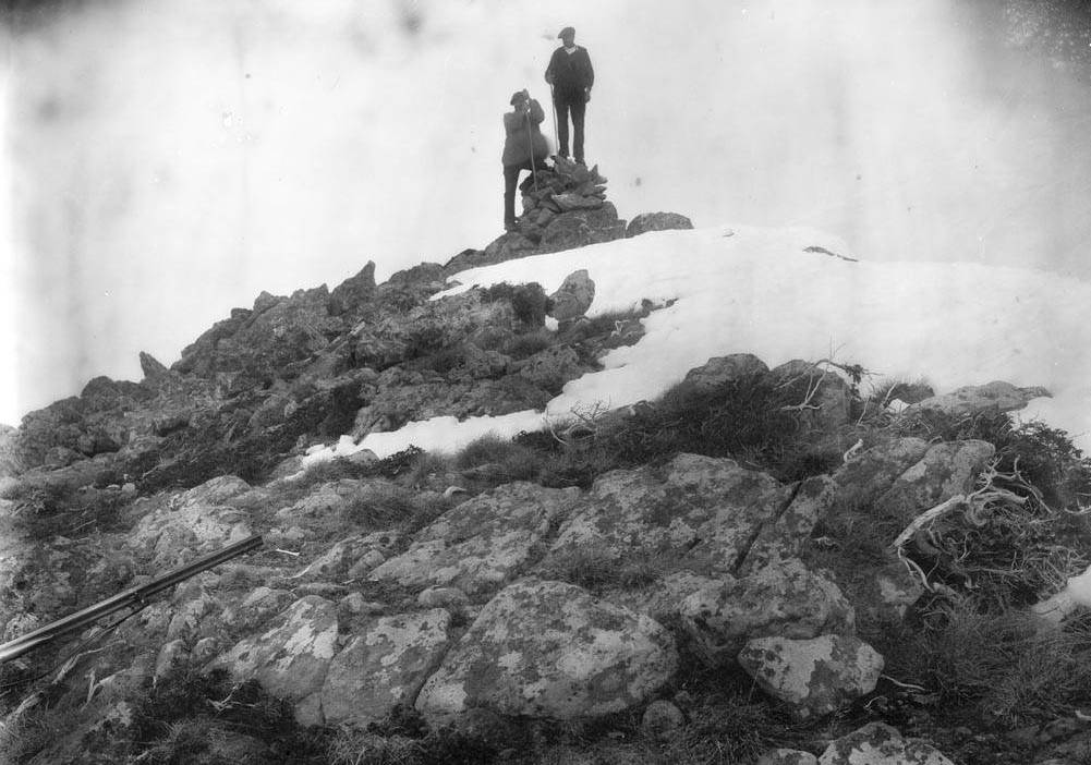 Imatge